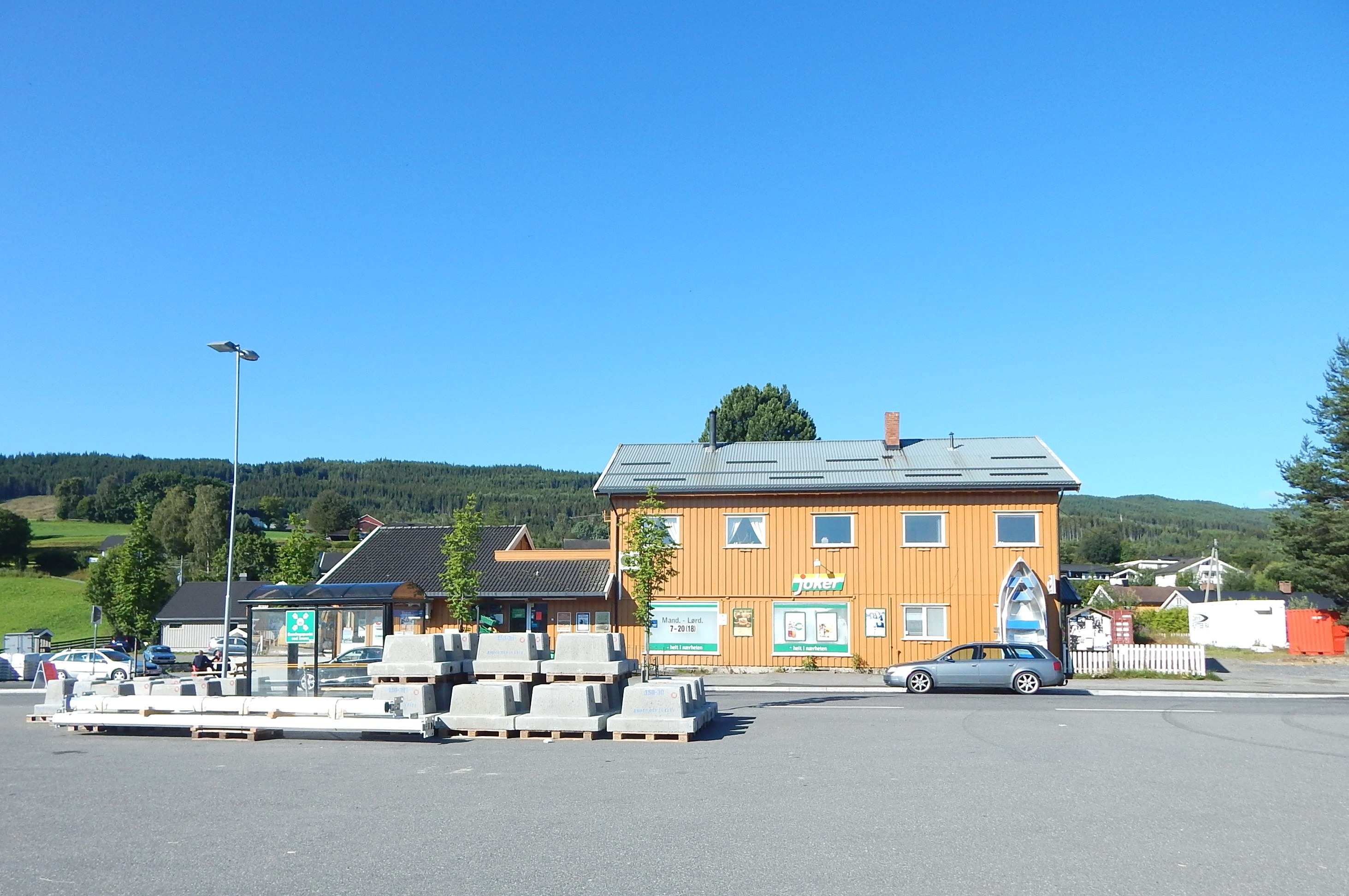 Vingrom sentrum med dagligvareforretning